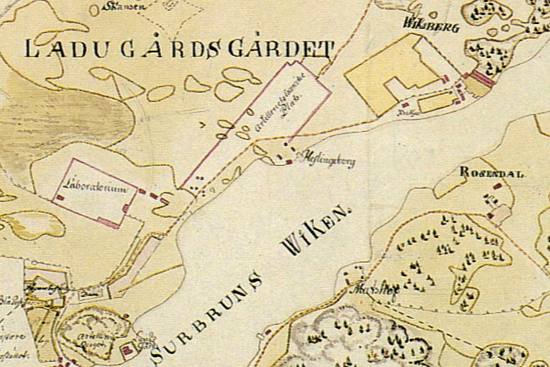 Del av Charta öfver Kongel: Djurgården år 1802 (med Hesslingeberg mitt i kartbilden)